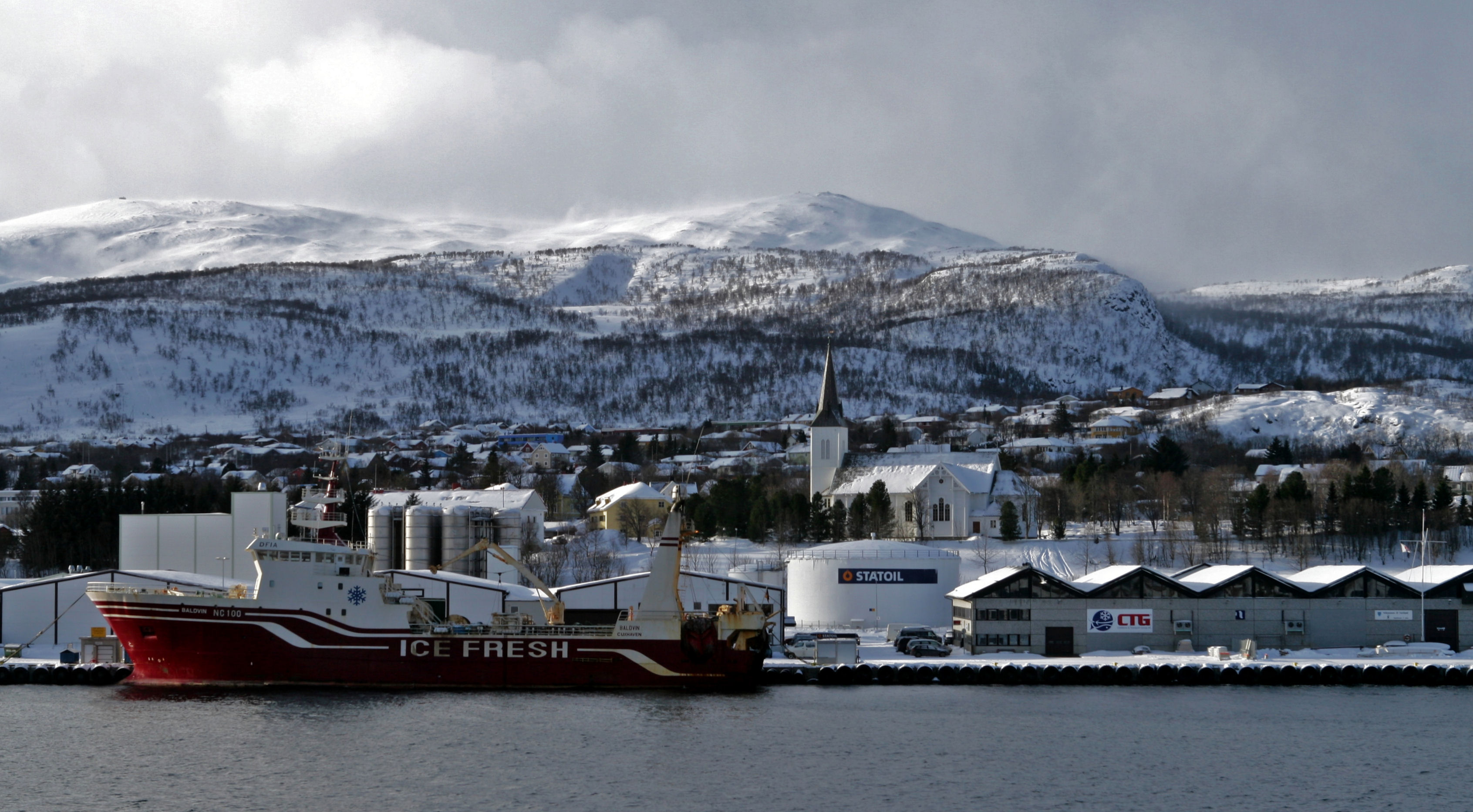 Winter 2006-2007